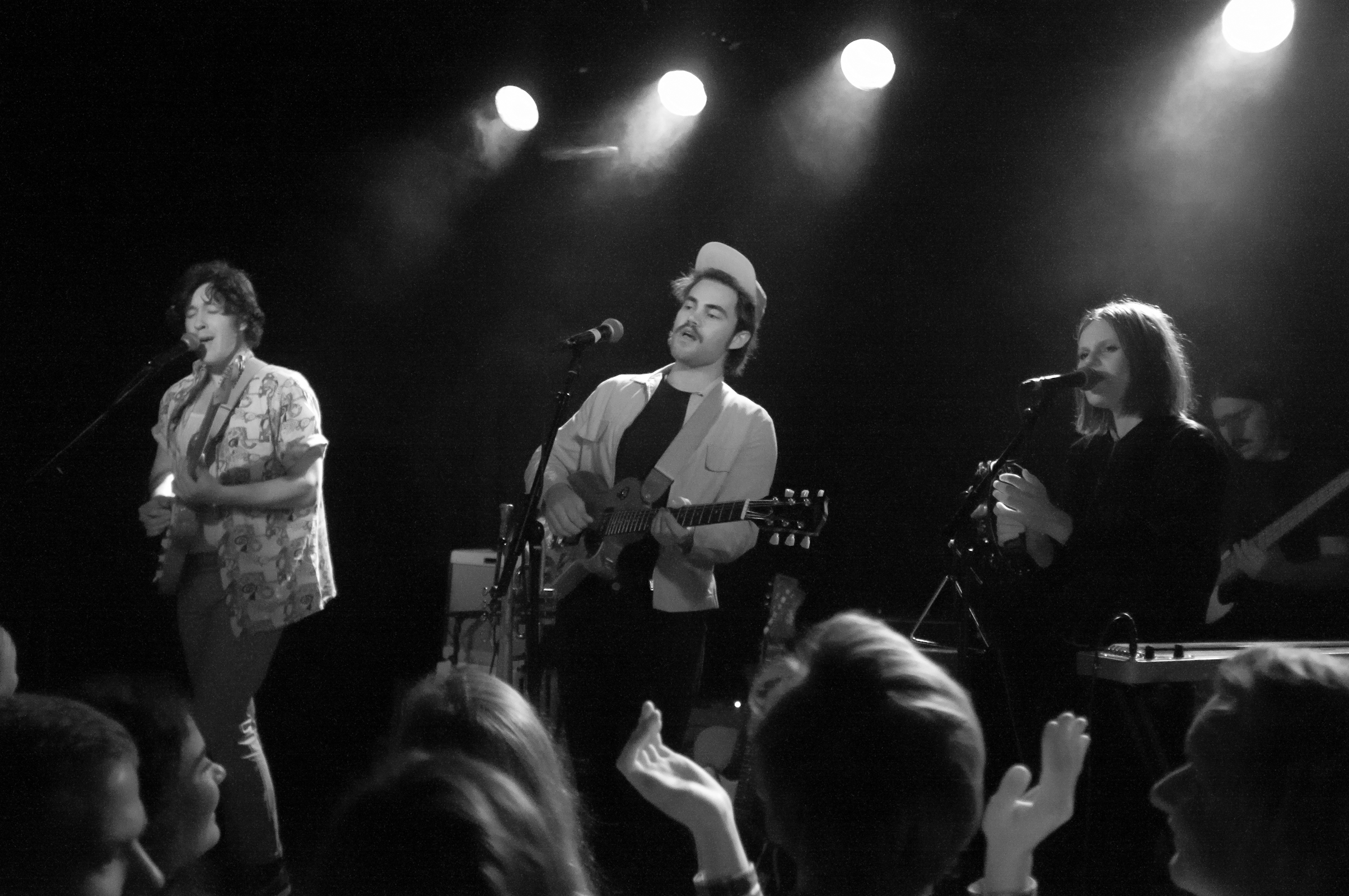 Mikhael Paskalev på Total 2012